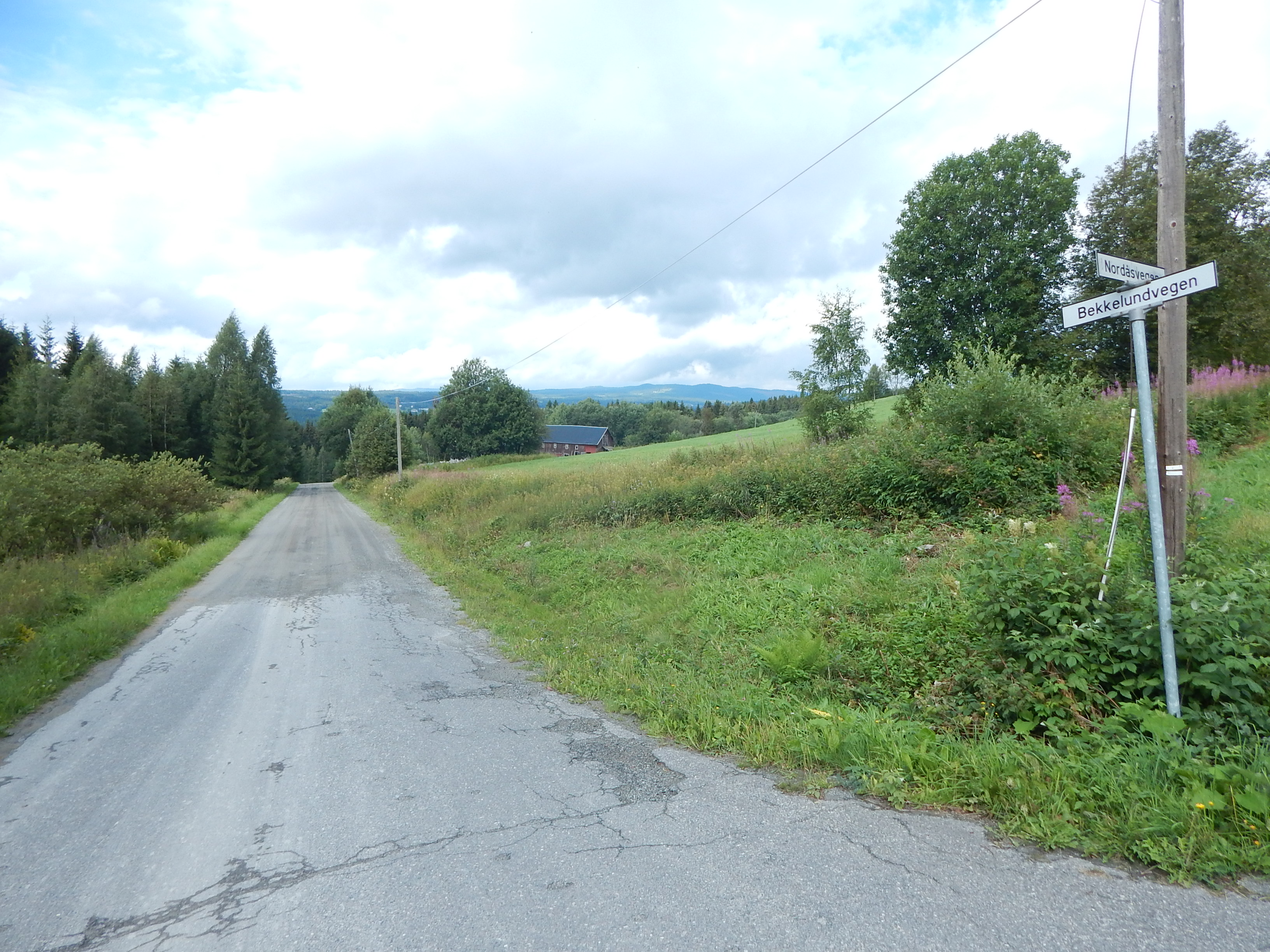 Bekkelundvegen (fylkesvei 1720, tidl. 53) vestover fra krysset med Nordåsvegen (fylkesvei 1718, tidl. 52)